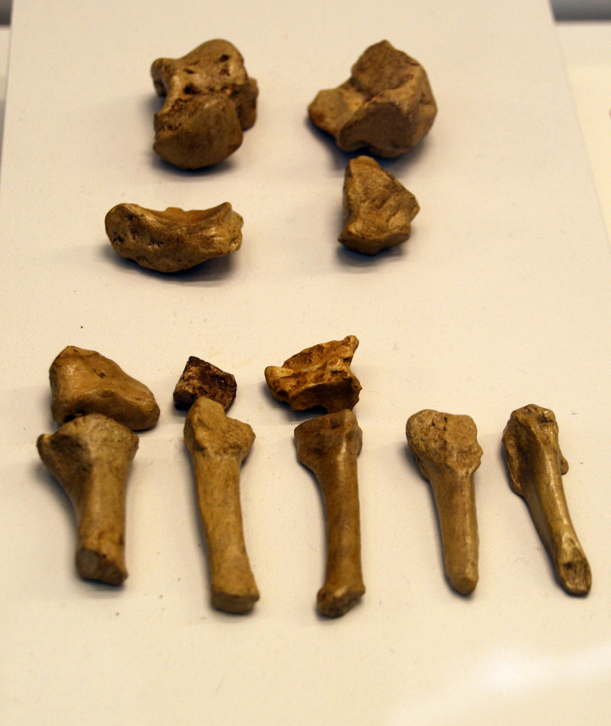 Pie de Homo habilis, OH 8. Réplica Original: FLK N, Garganta de Olduvai (Tanzania) 1,75 millones de años Museo Nacional de Dar Es Salaam, Tanzania Réplica: Instituto de Evolución en África Exhibido en exposición temporal, "La cuna de la humanidad", en el Museo Arqueológico de Regional de Madrid